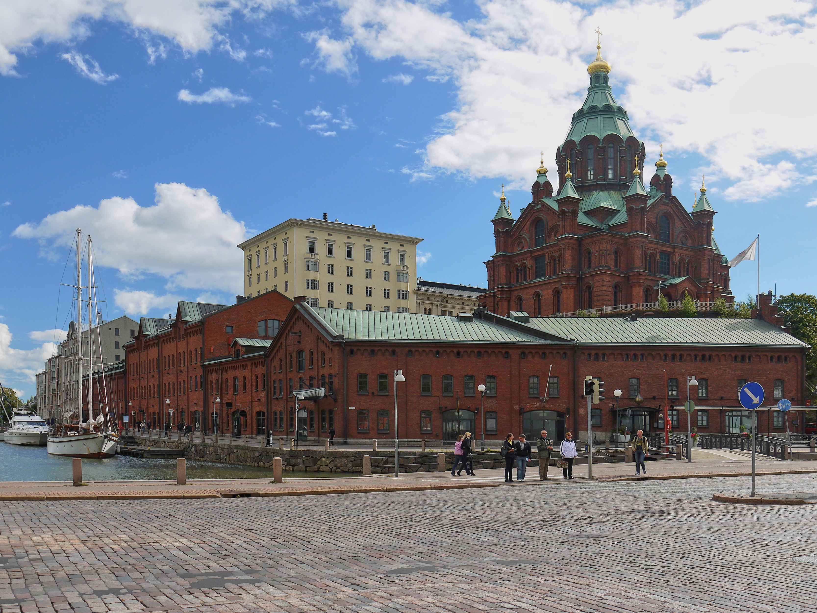 Kanavaranta.